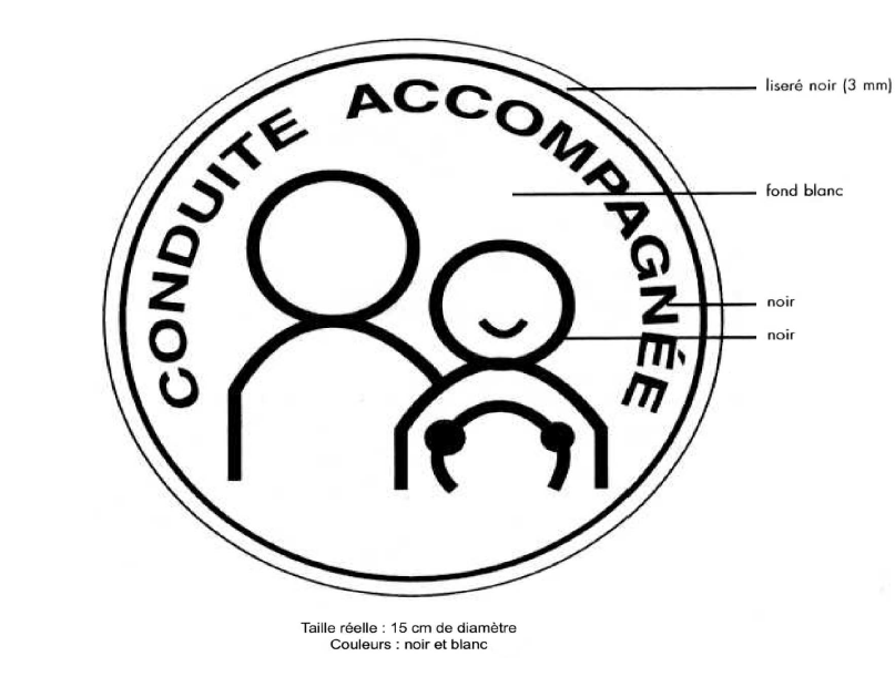 Permis de conduire en France - Signe distinctif autocollant ou magnétisé à apposer à la'rrière d'un véhicule en cas d'apprentissage anticipé de la conduite.